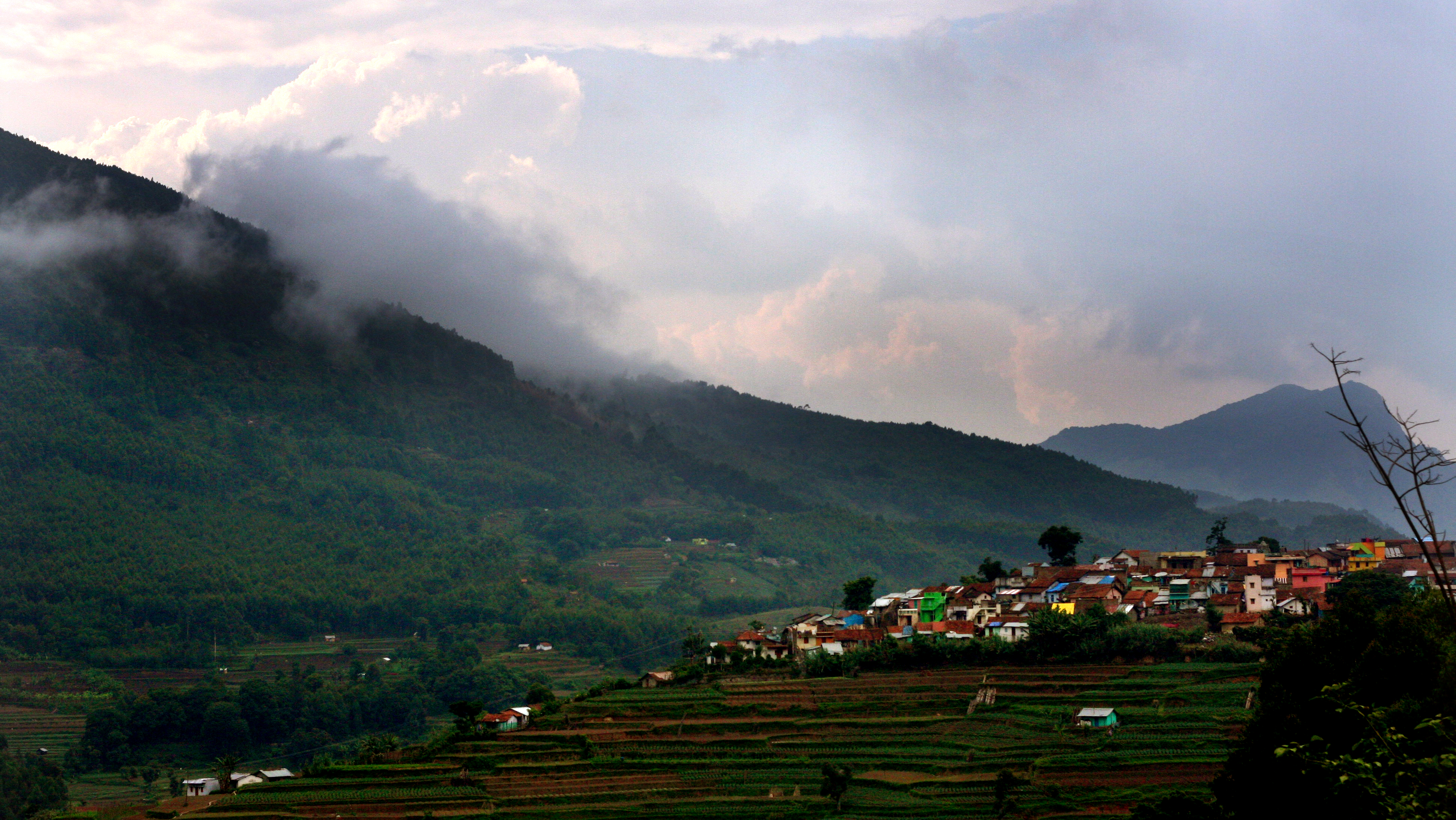 This media file is uploaded with Malayalam loves Wikimedia event - 3.